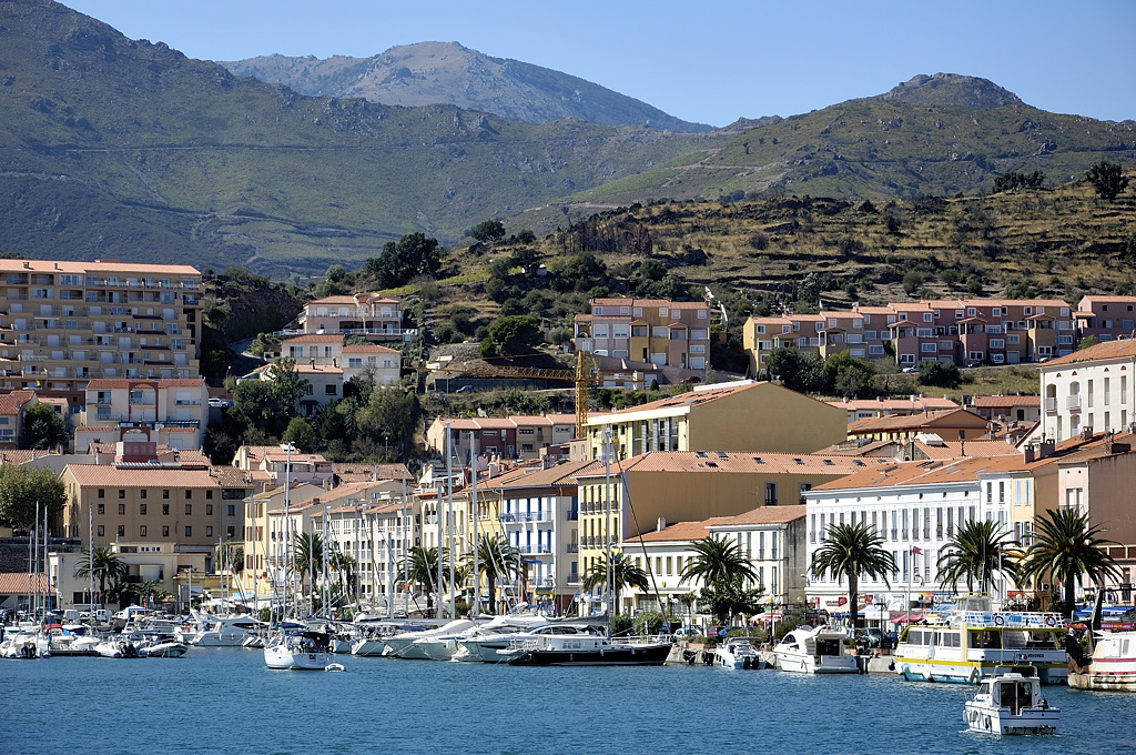 Port-Vendres